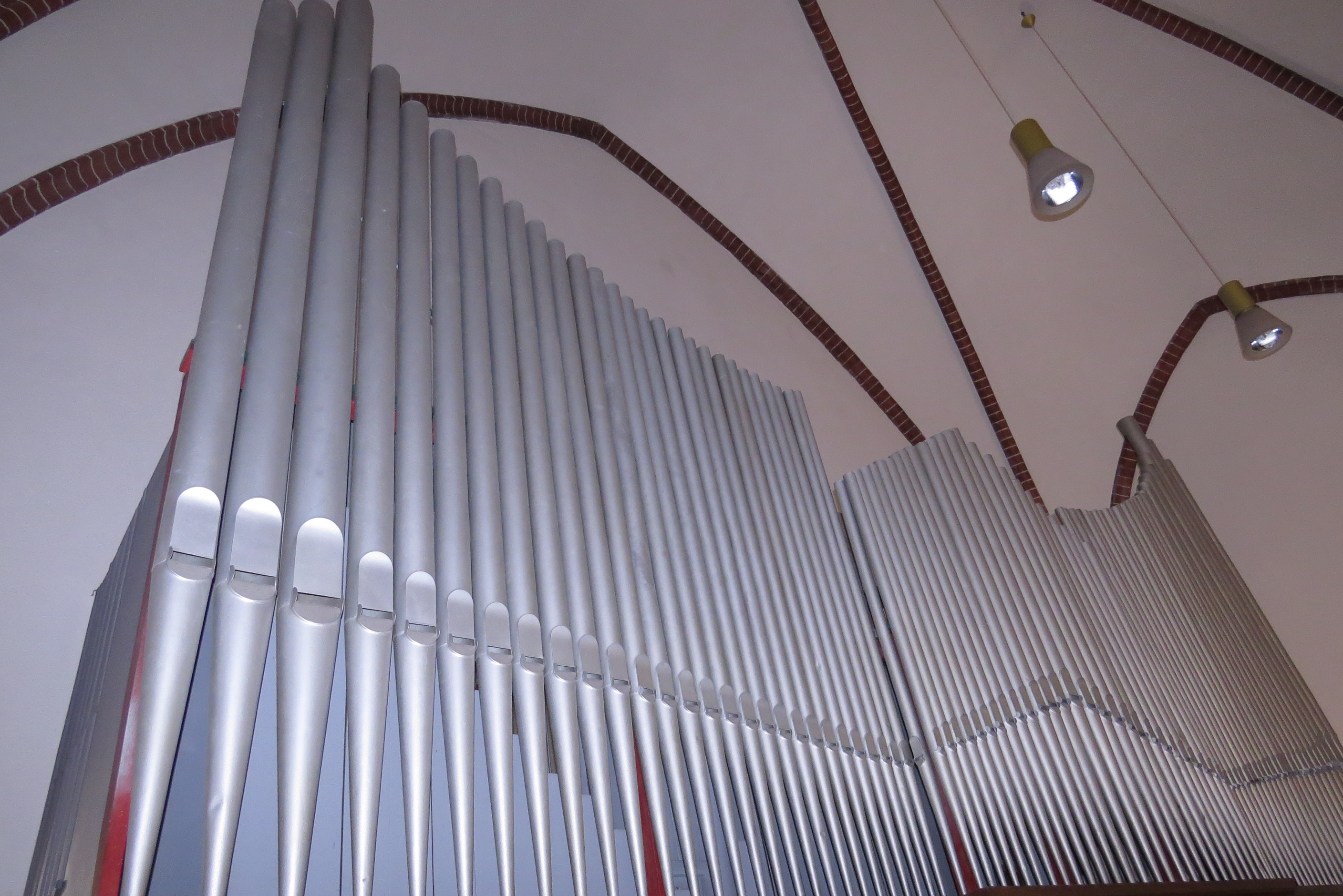 Kirche St. Georg, Berlin-Pankow, Orgelprospekt